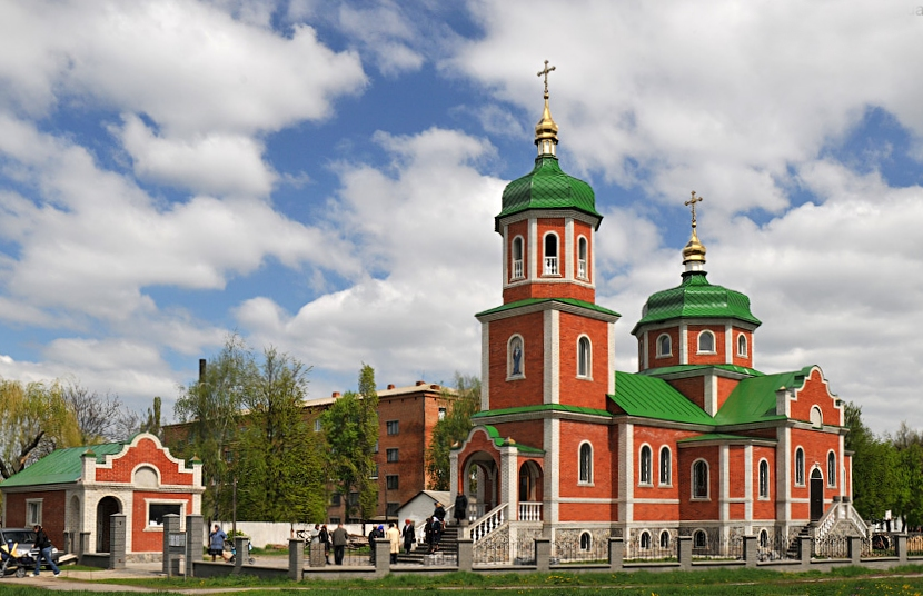 Успенская церковь в Хороле Полтавской области